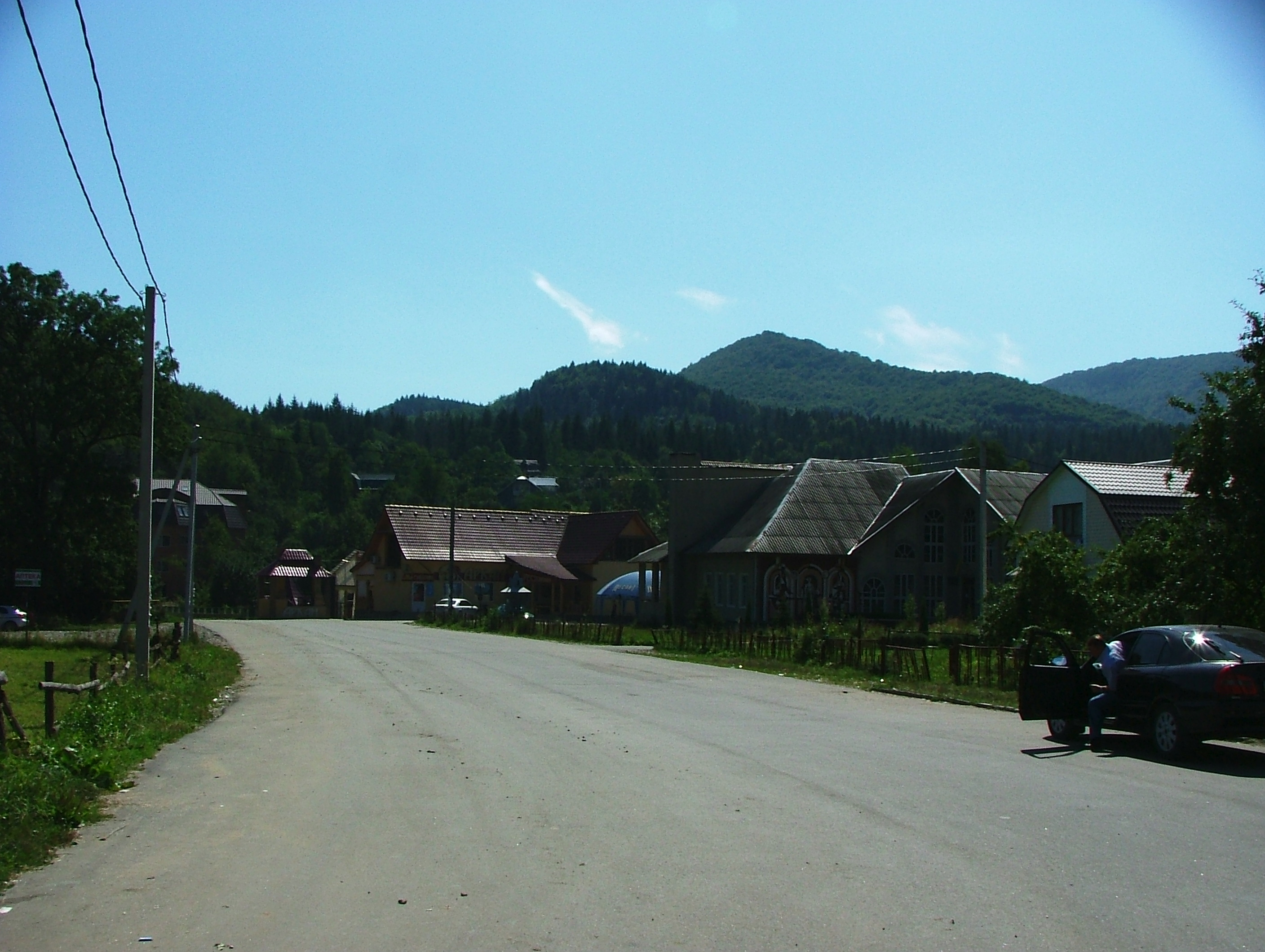 село Шешори (Косівський район)